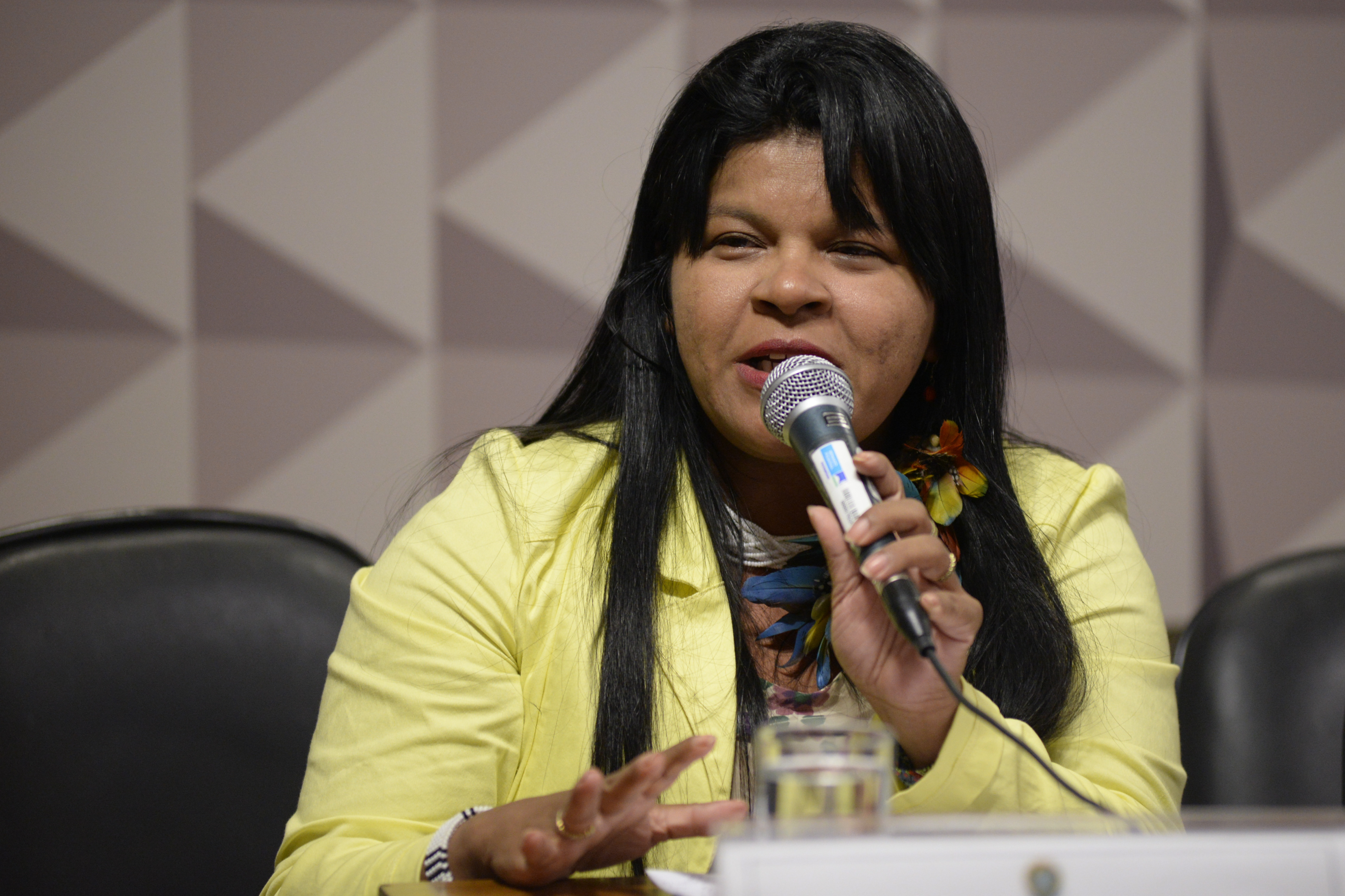 Comissão Mista da Medida Provisória nº 756, de 2016, que altera os limites do Parque Nacional do Rio Novo, da Floresta Nacional do Jamanxim e cria a Área de Proteção Ambiental do Jamanxim, realiza audiência pública. Em pronunciamento, coordenadora da Articulação dos Povos Indígenas do Brasil (Apib), Sônia Bone Guajajara. Foto: Jefferson Rudy/Agência Senado